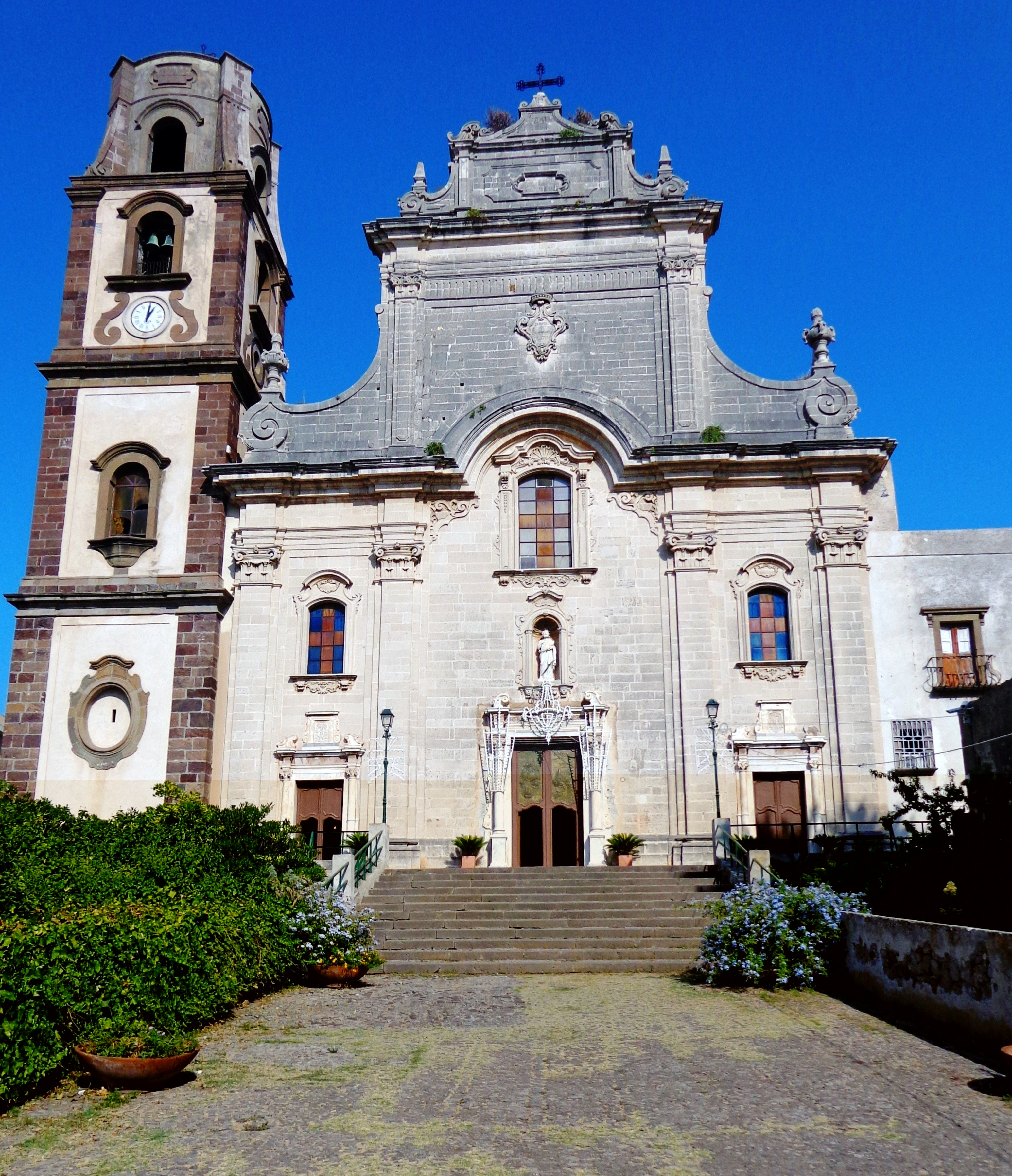 Cattedrale di San Bartolomeo Lipari